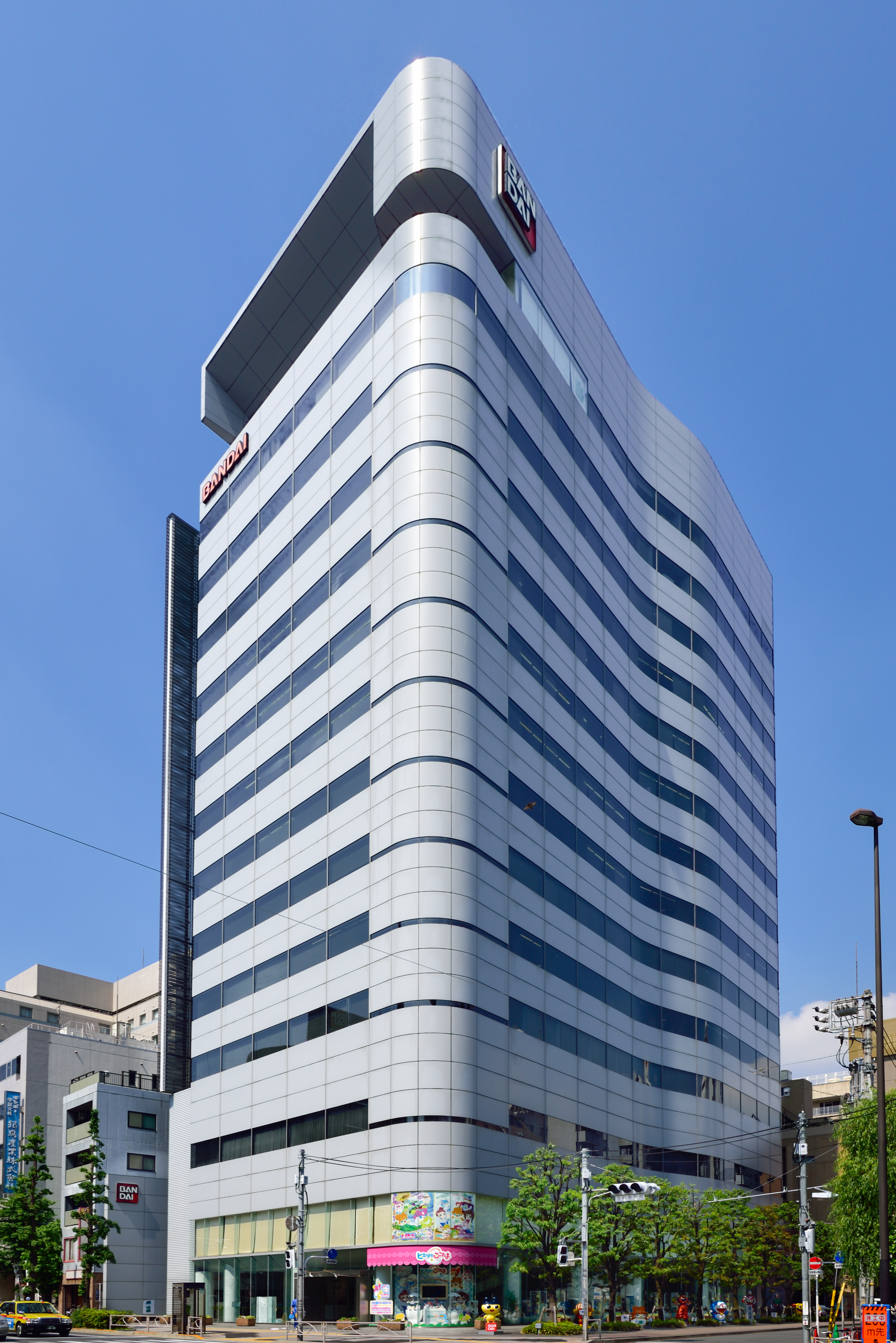 バンダイ本社ビル。浅草駒形。